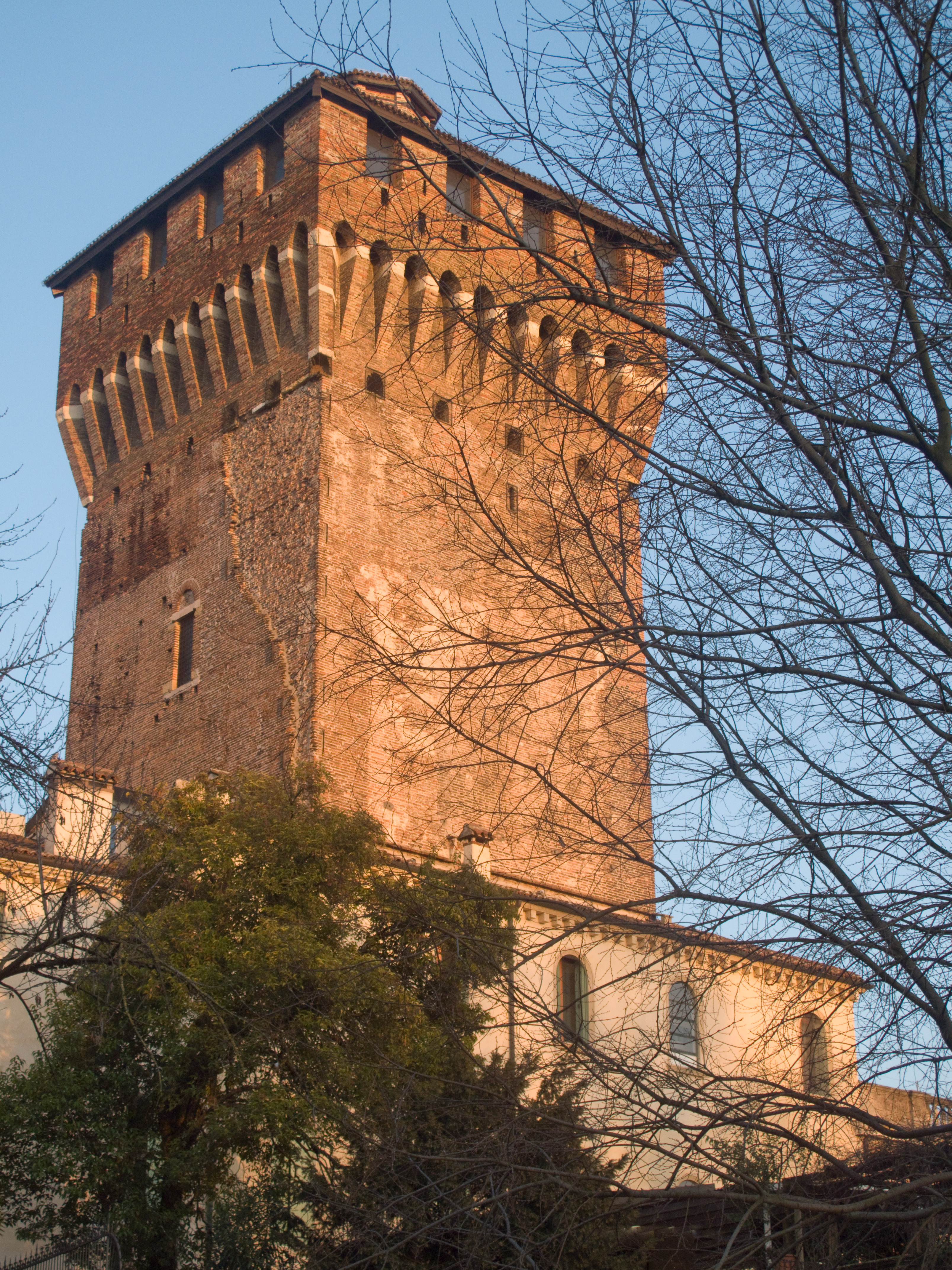 Vicenza - Torrione di Porta Castello con merlatura viscontea